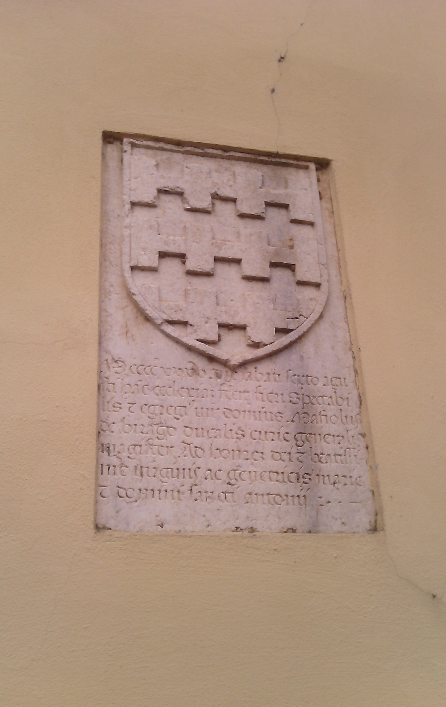 Lapide di Maffiolo Birago murata sulla chiesa parrocchiale di Cassinetta di Lugagnano (MI) - Italy